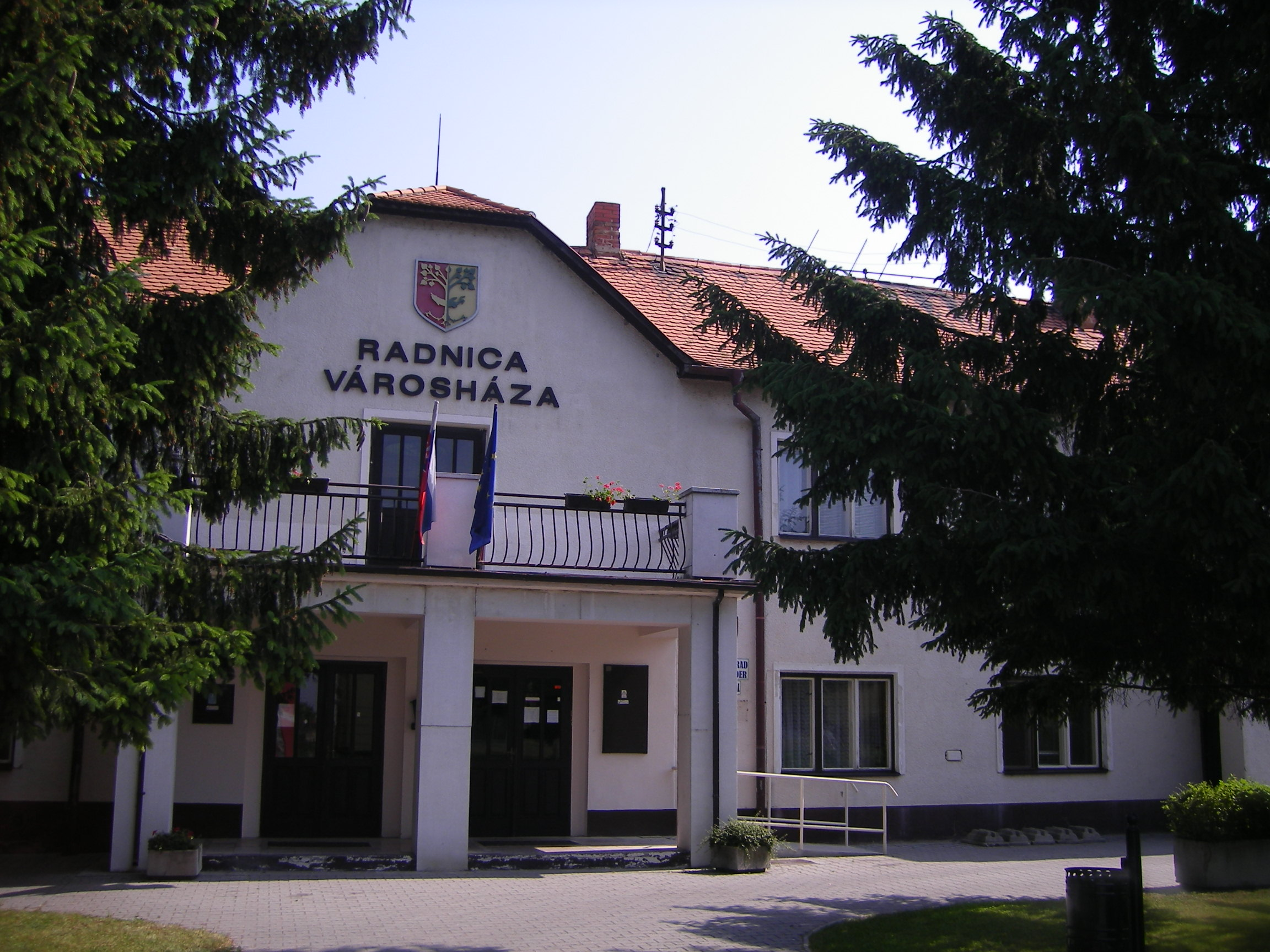 Nagymegyer - városháza (Komáromi utca)